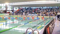 Piscine Municipale Antibes